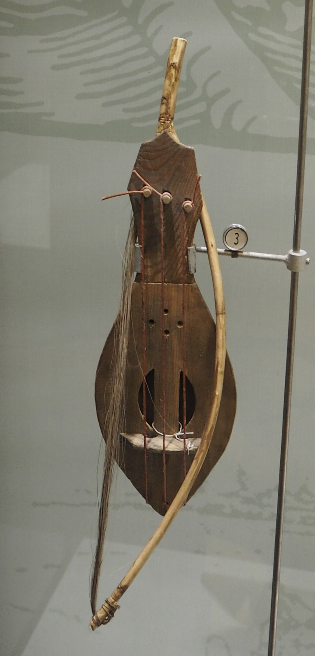 Реконструкция Н. Л. Кривоноса. Смык (Гудок). Новгород, XIV век. Российский национальный музей музыки.